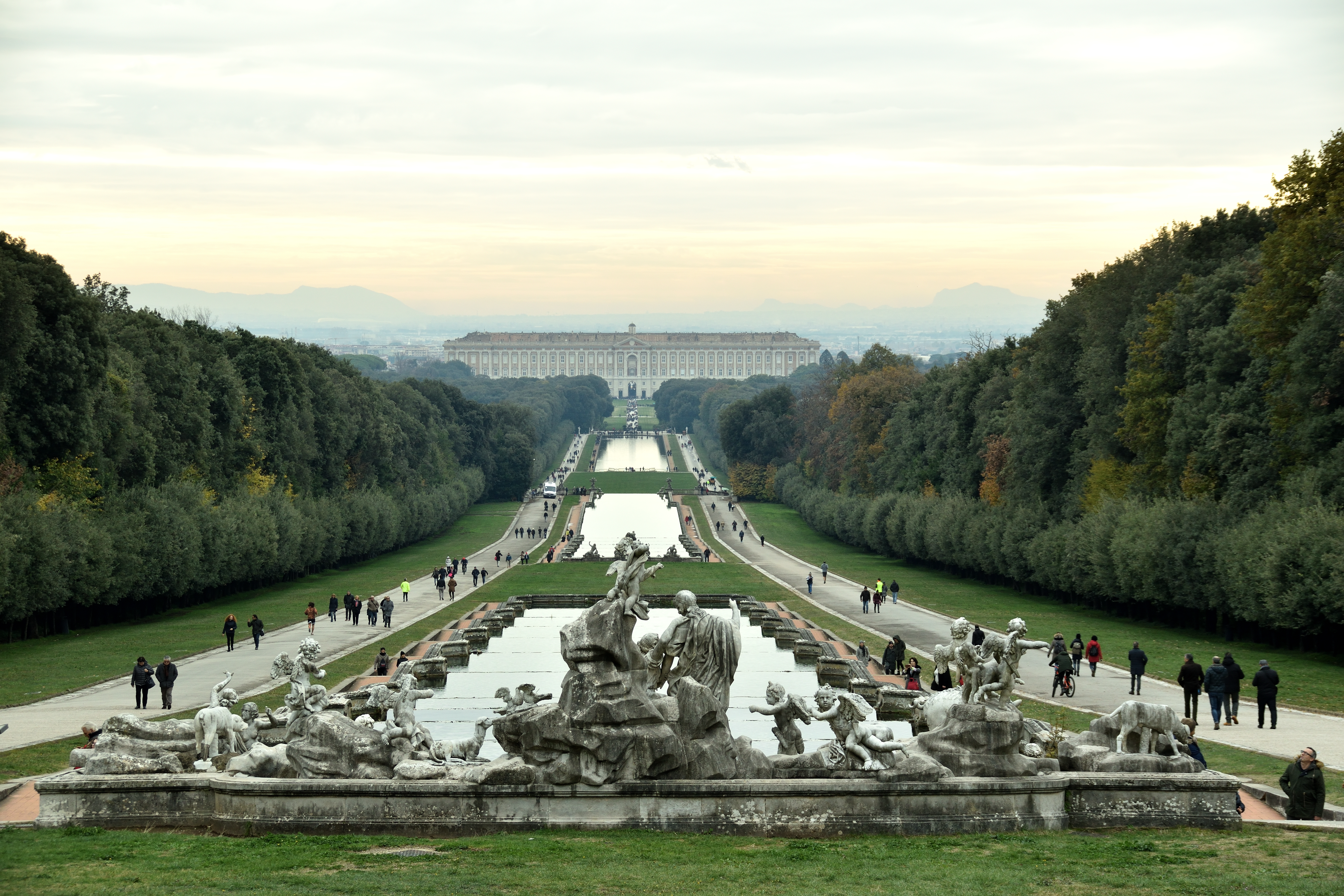 Via d'acqua Reggia di Caserta